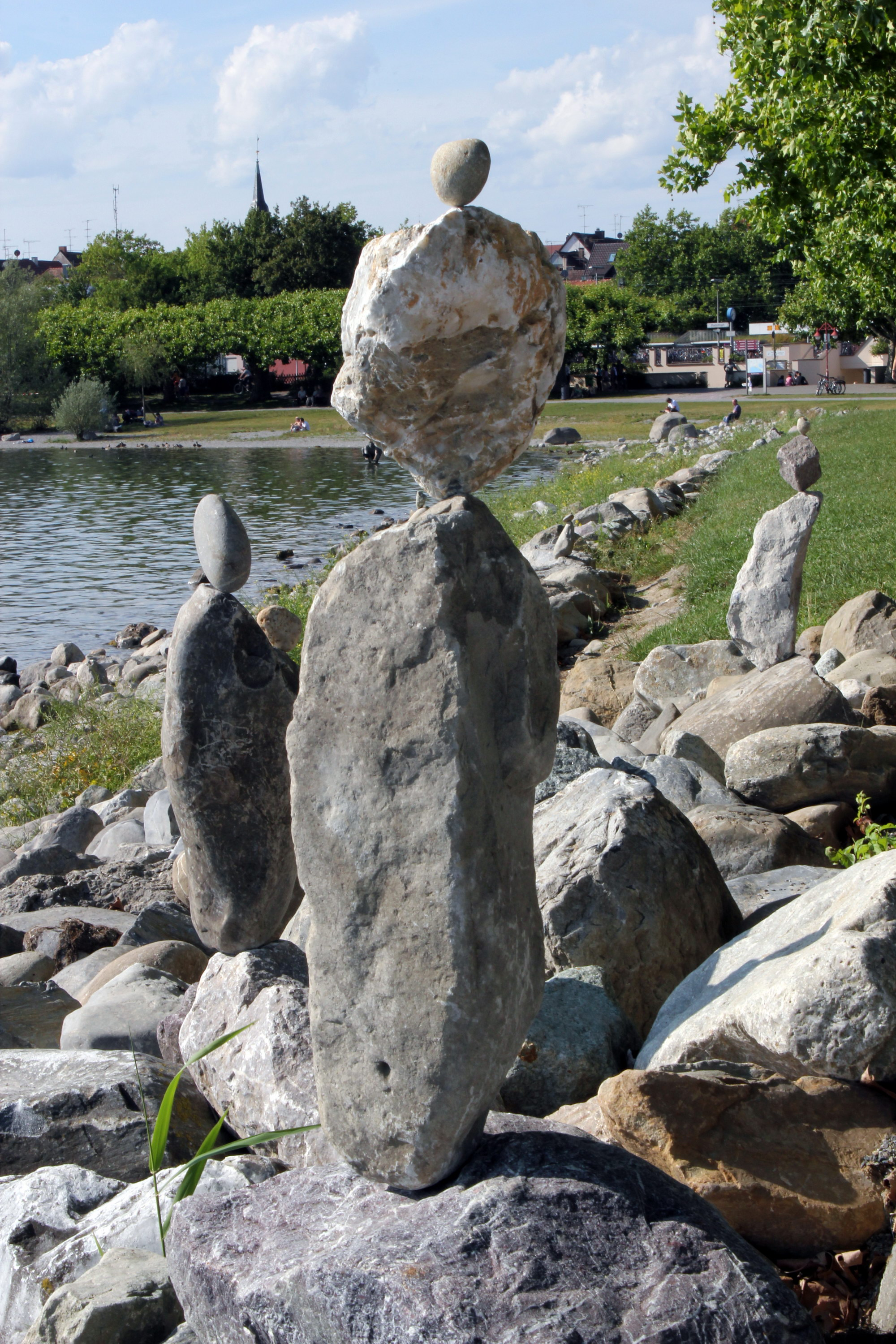 Steinkunst von Josef „Sepp“ Bögle, Radolfzell, Juni 2011